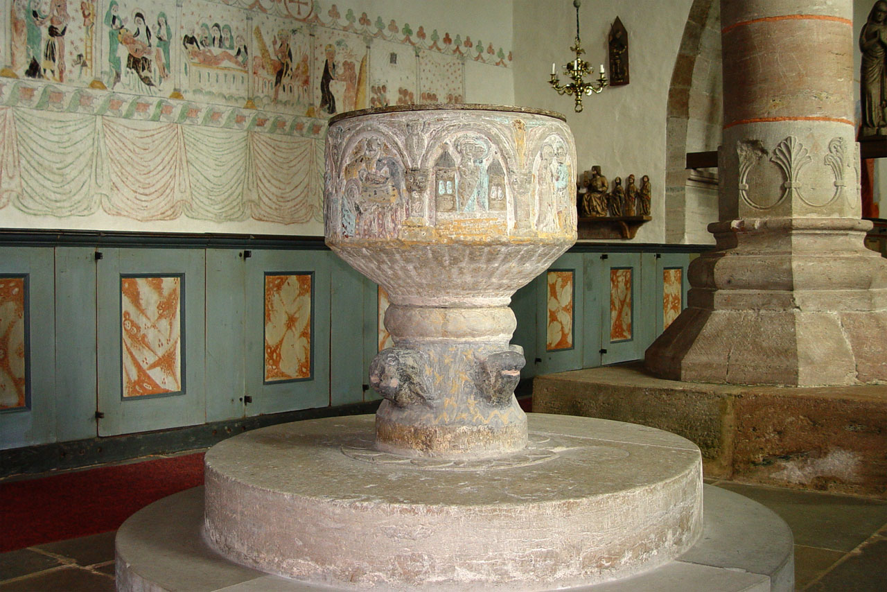 Hamra kyrka (Gotland). Taufbecken aus Sandstein, hergestellt von Meister Semi-Bysantios im 12.Jh.